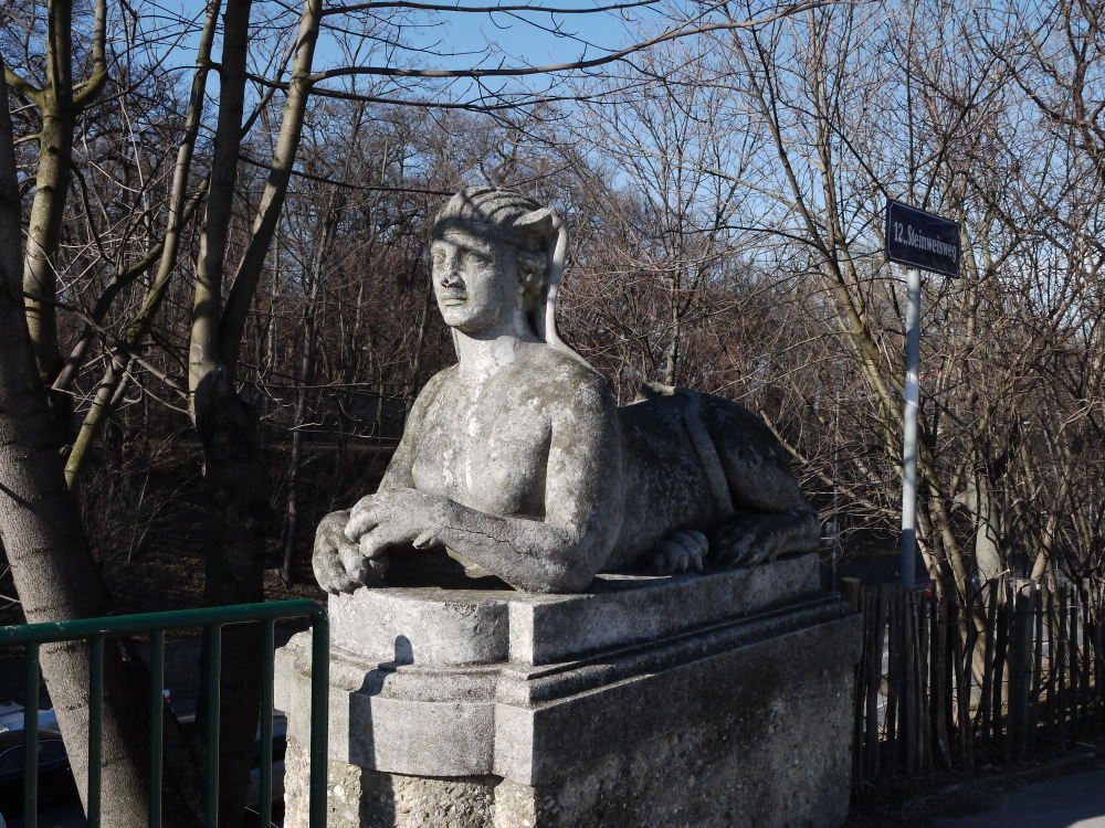 Schönbrunn Sphinx hinterer Eingang